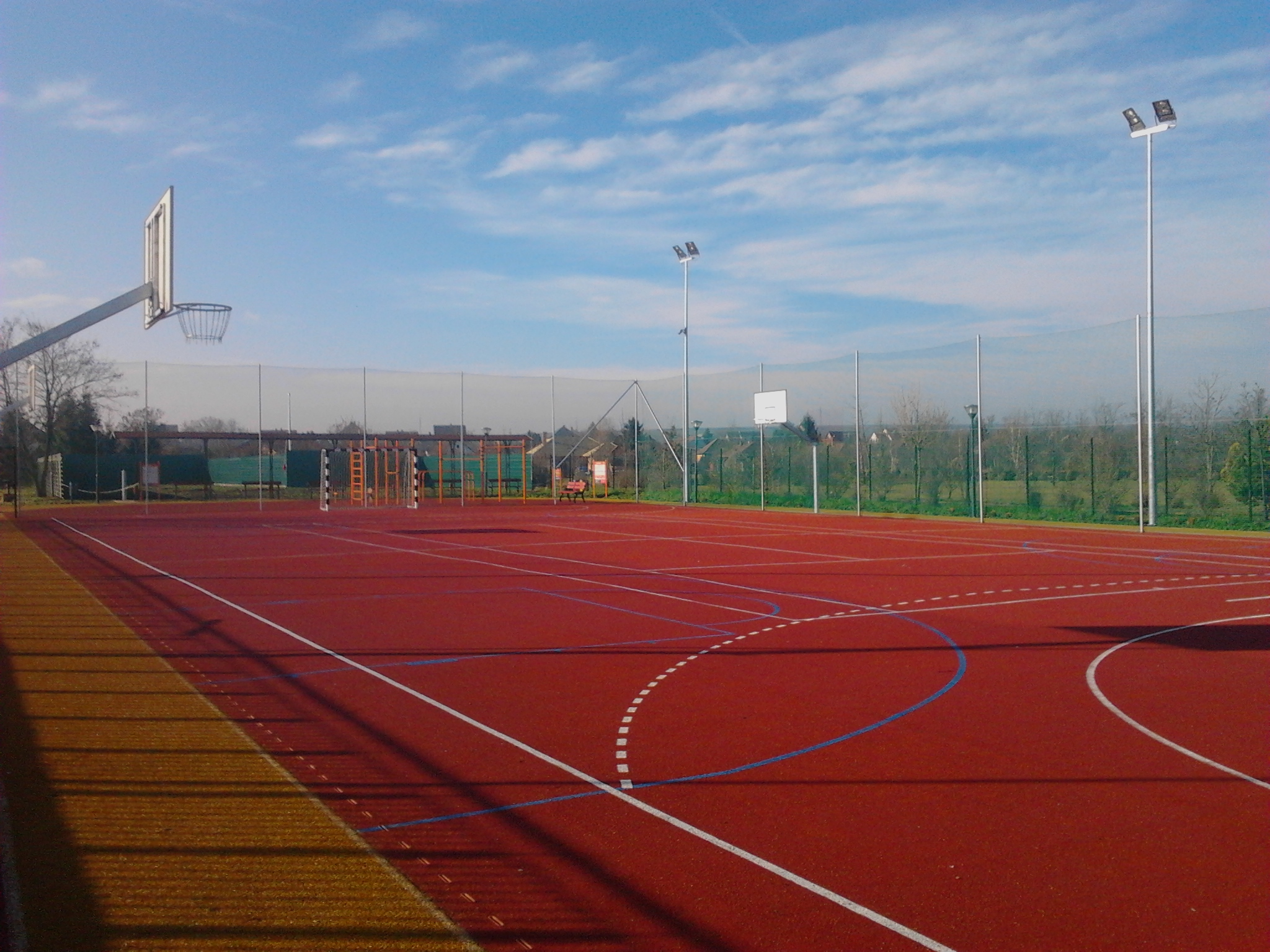 A maklári sportcentrum 2017 őszén átadott kosárpályája.